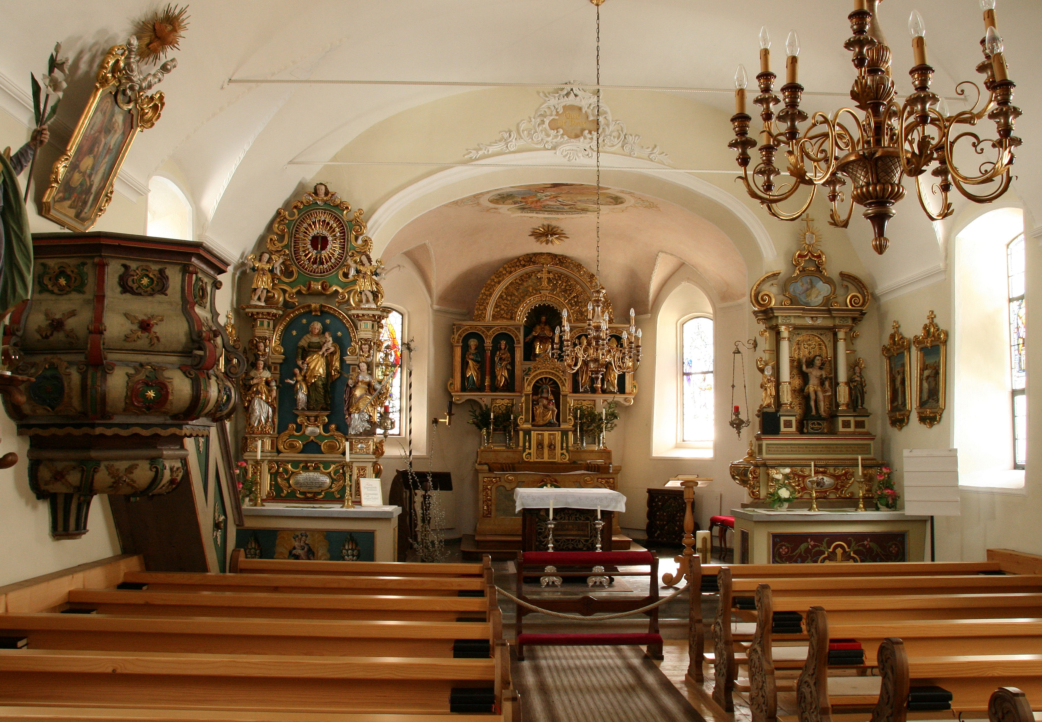 Kuratienkirche hl. Maria Magdalena, in Gargellen, Vorarlberg, mit Hauptaltar von Moriz Schlachter